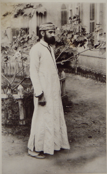 BERNARD Emile, au Caire, c. 1896 (Inha)